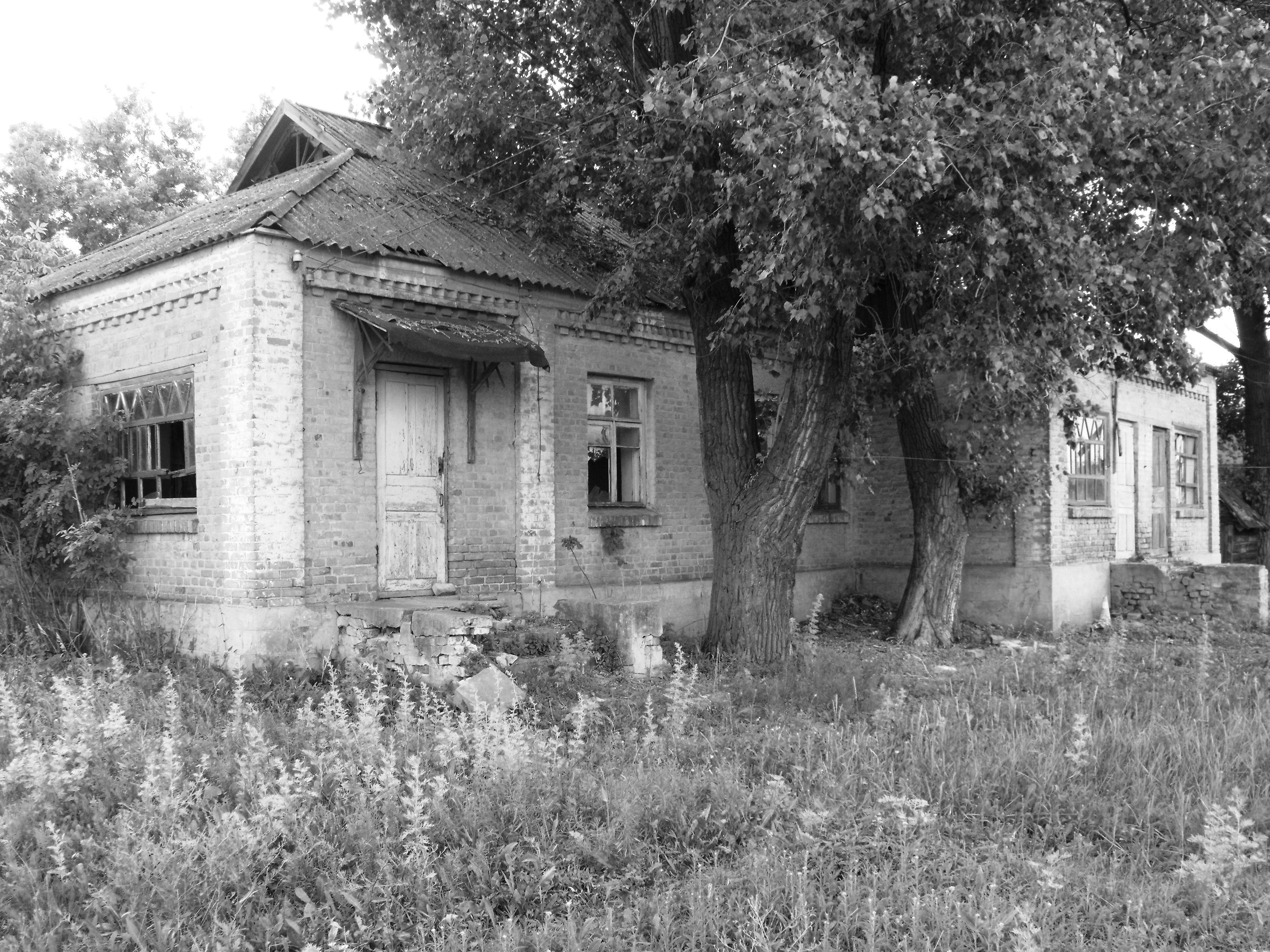 Старейшее здание посёлка (1913 г.)